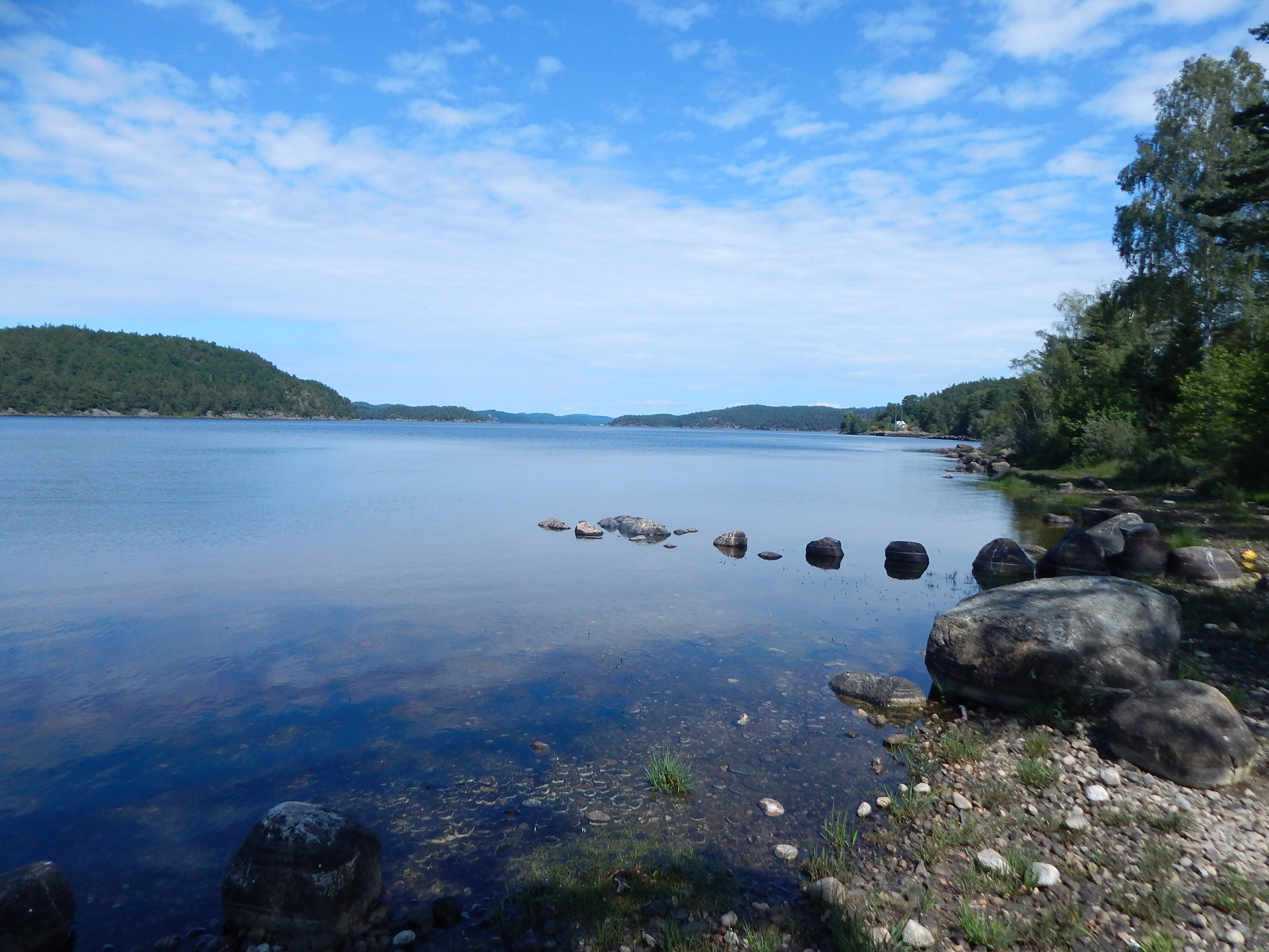 Rore ved Roresanden